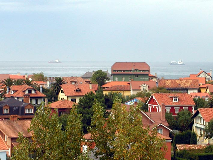 Playa de Salinas, Asturias. Fernando Soler del Campo